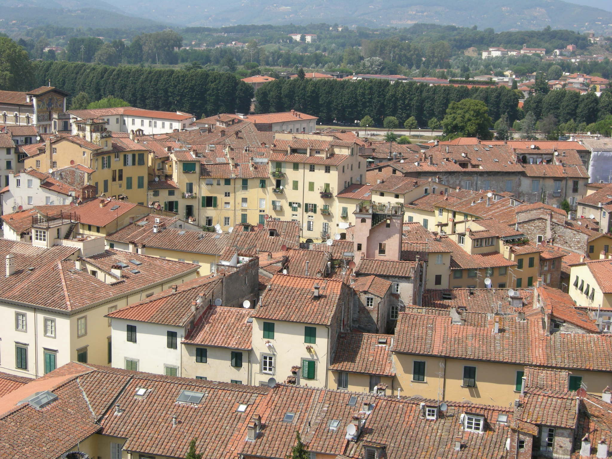 Torre guinigi, view 11, piazza dell'anfiteatro